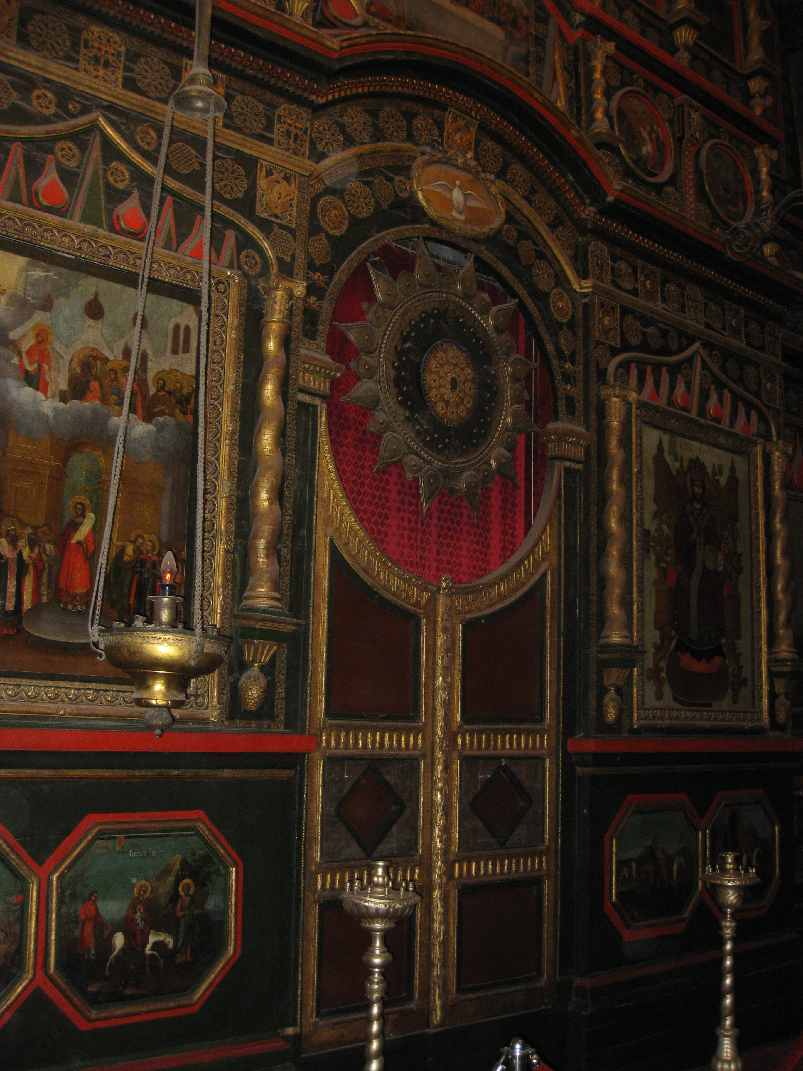 Saint Basil's Cathedral in Red Square קתדרלת סנט בזיל בכיכר האדומה